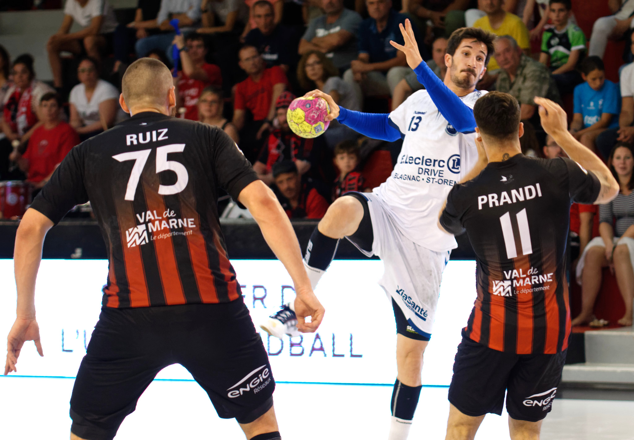 Rencontre de championnat de LidlStarLigue entre l'US Ivry et Toulouse. A Ivry, le 31 mai 2017.